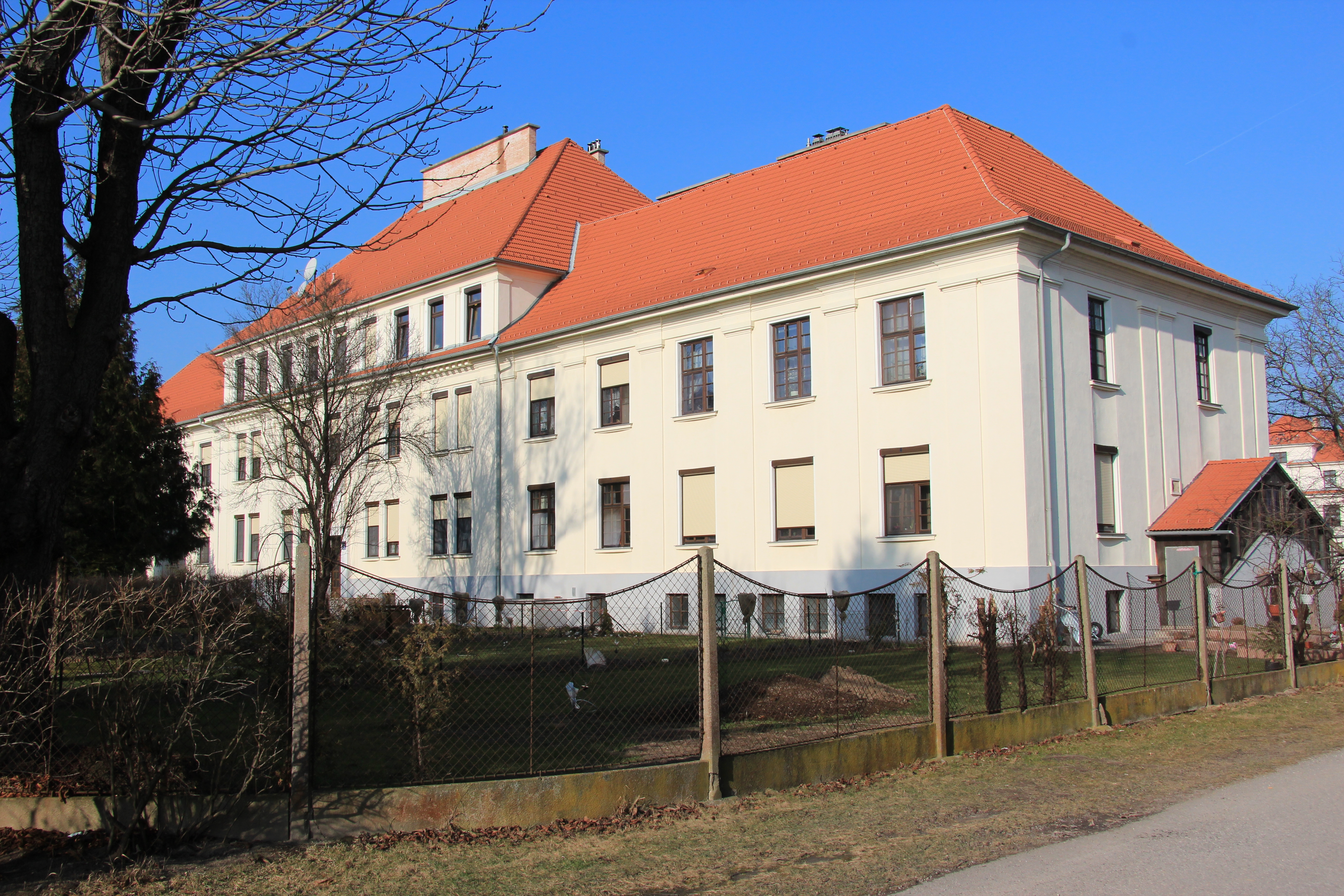 Ehemalige Salvator-Kaserne („Objekt I“) in (Blumau-)Neurißhof, Niederösterreich, Kasernenstraße 1